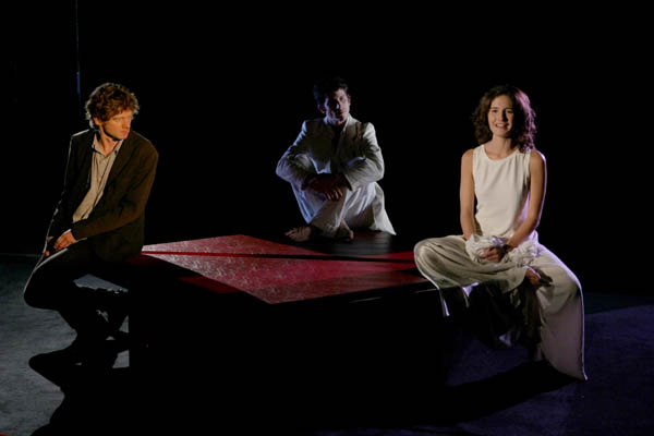 Nicolas Vaude, Chloé Lambert et Clément Sibony, en septembre 2004 (création de la pièce de théâtre L’Autre de Florian Zeller.)